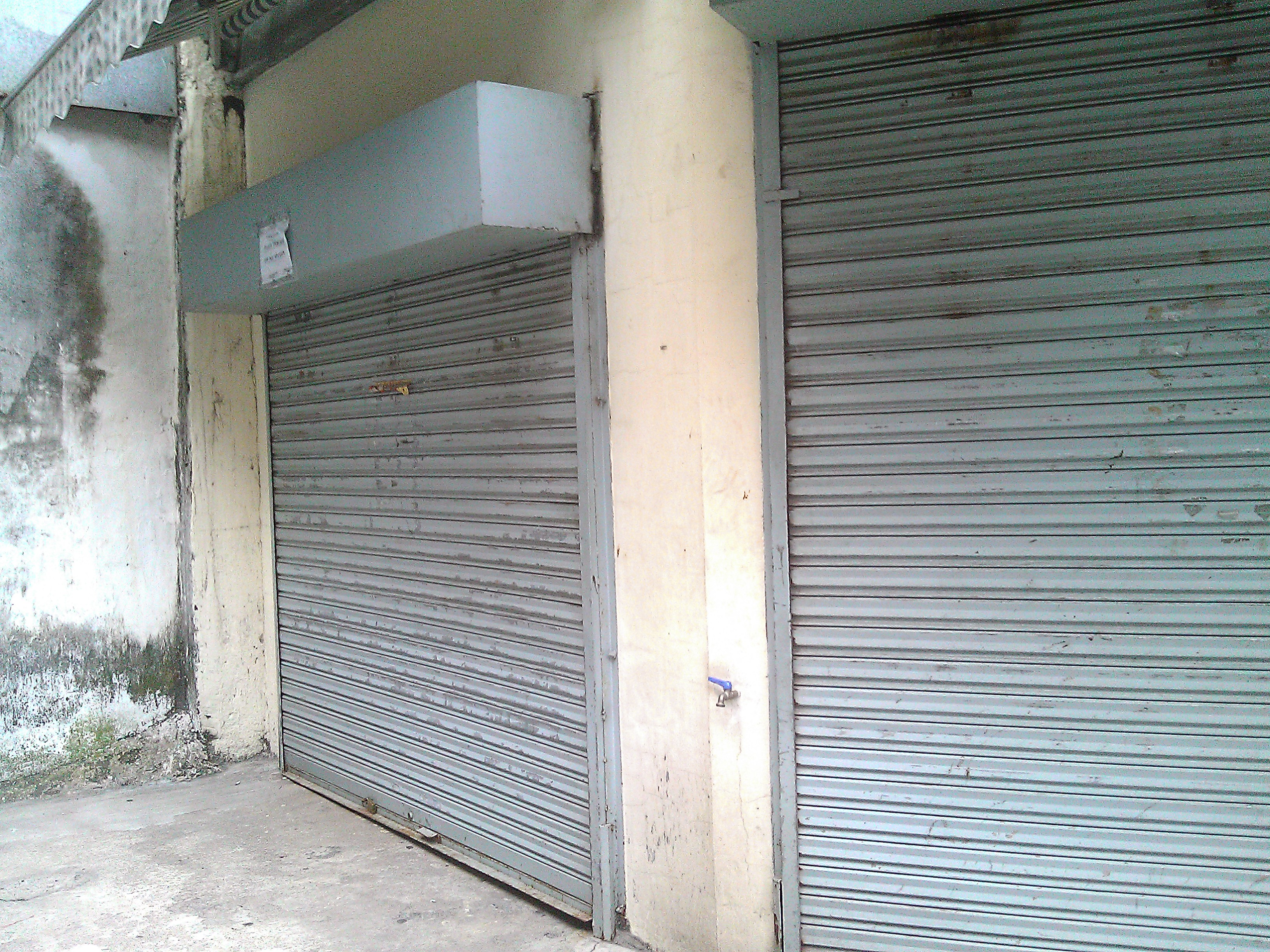 馬里14號